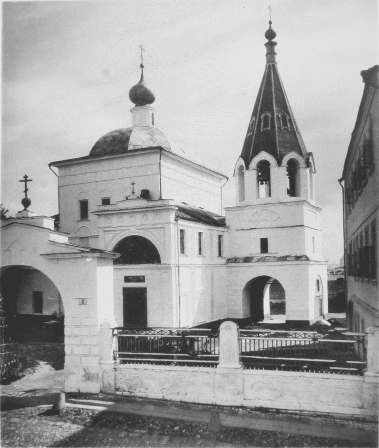 Храм Трёх Святителей на Кулишках